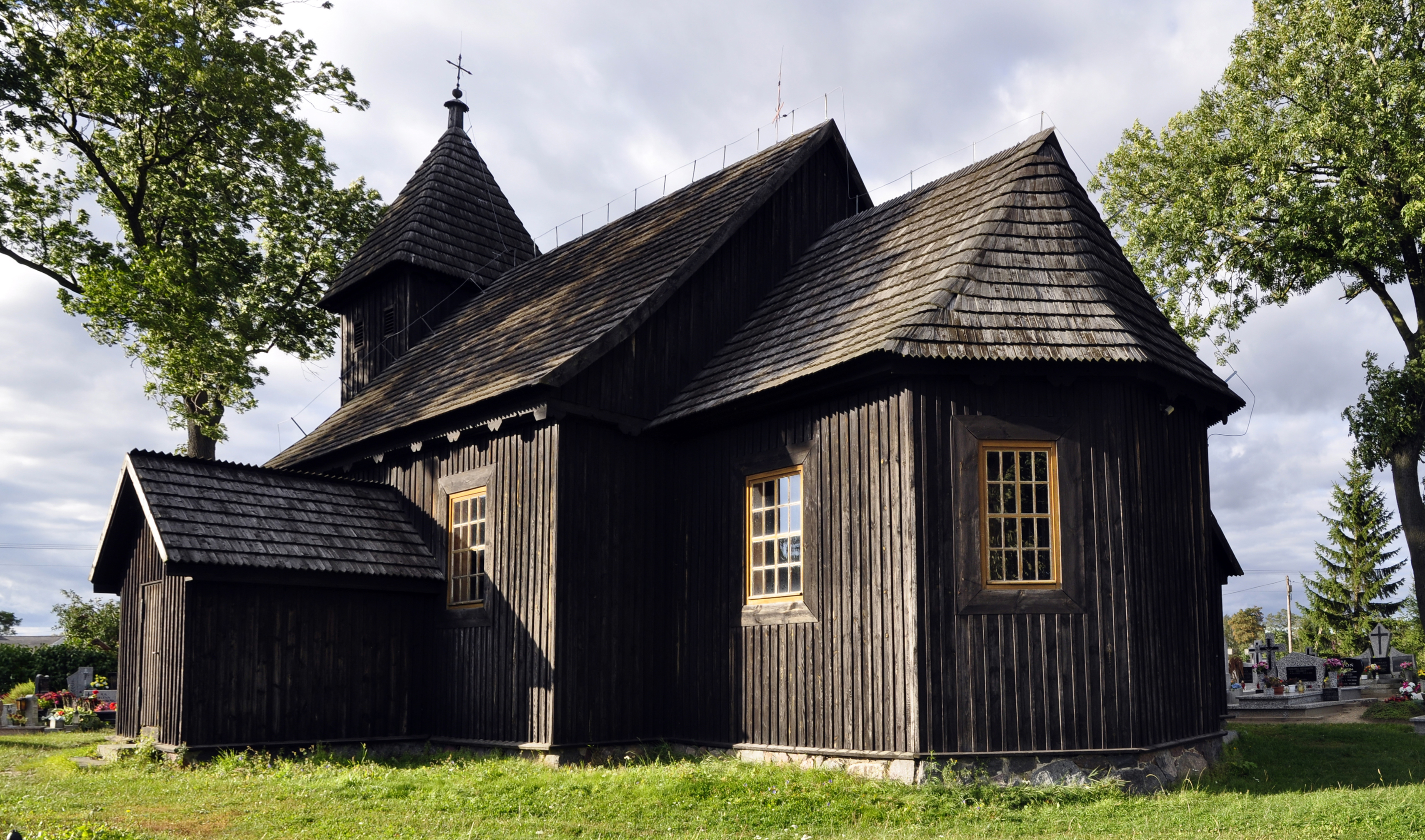 Włóki - kościół parafialny pw. św. Marii Magdaleny, drewn., XVII w.